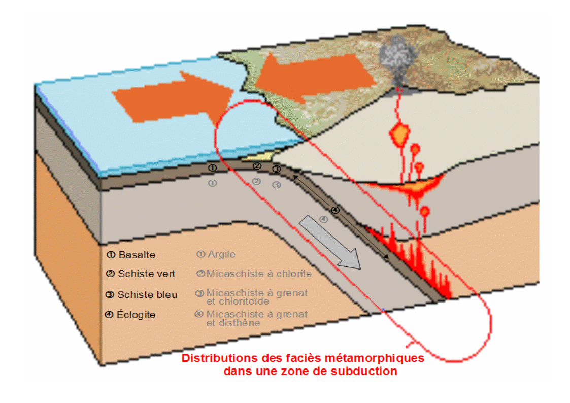 Schéma simplifié d'une zone de subduction avec ses faciès métamorphiques.